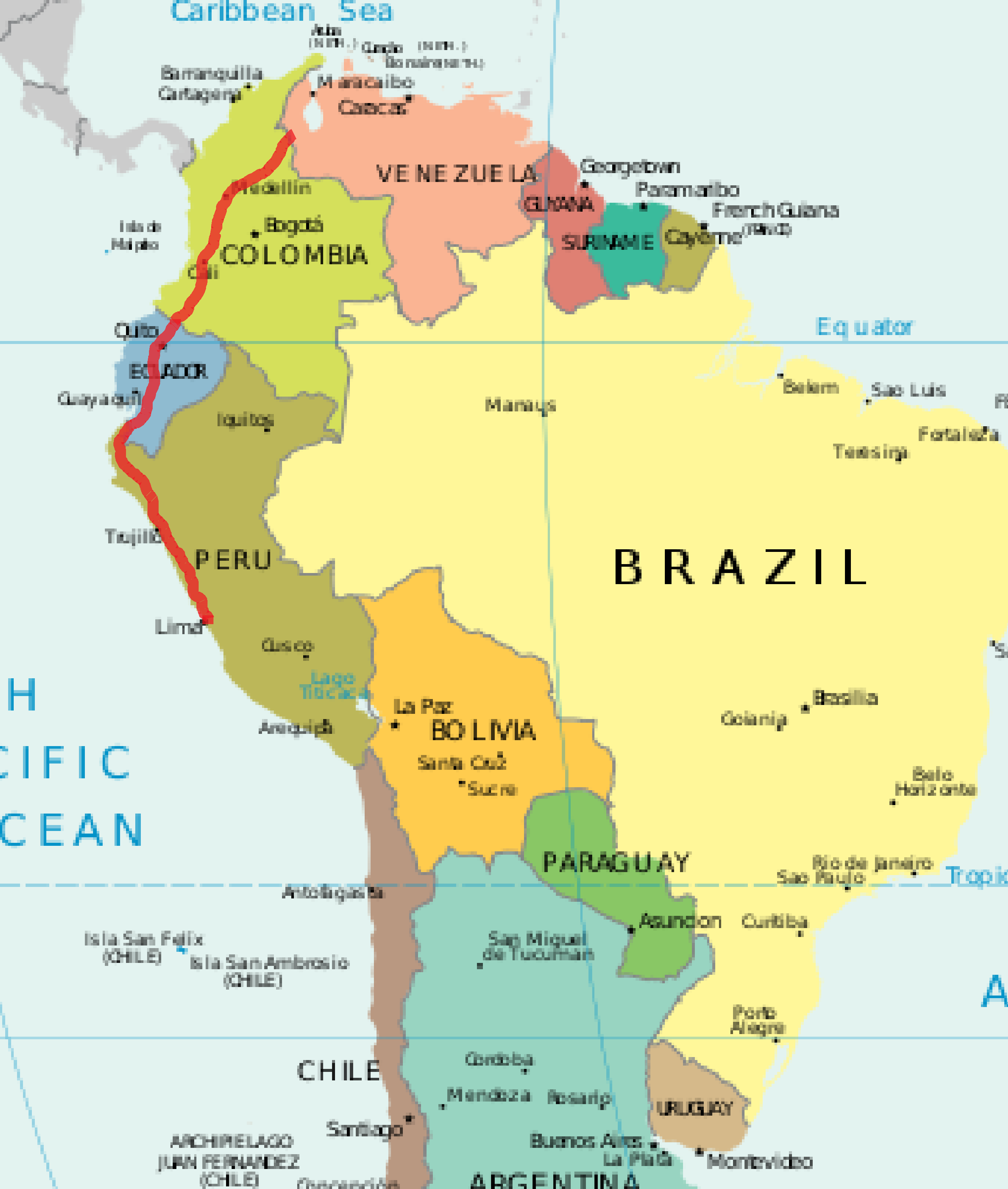 Ruta venezolana a Perú, guiado de esta imagen [1]